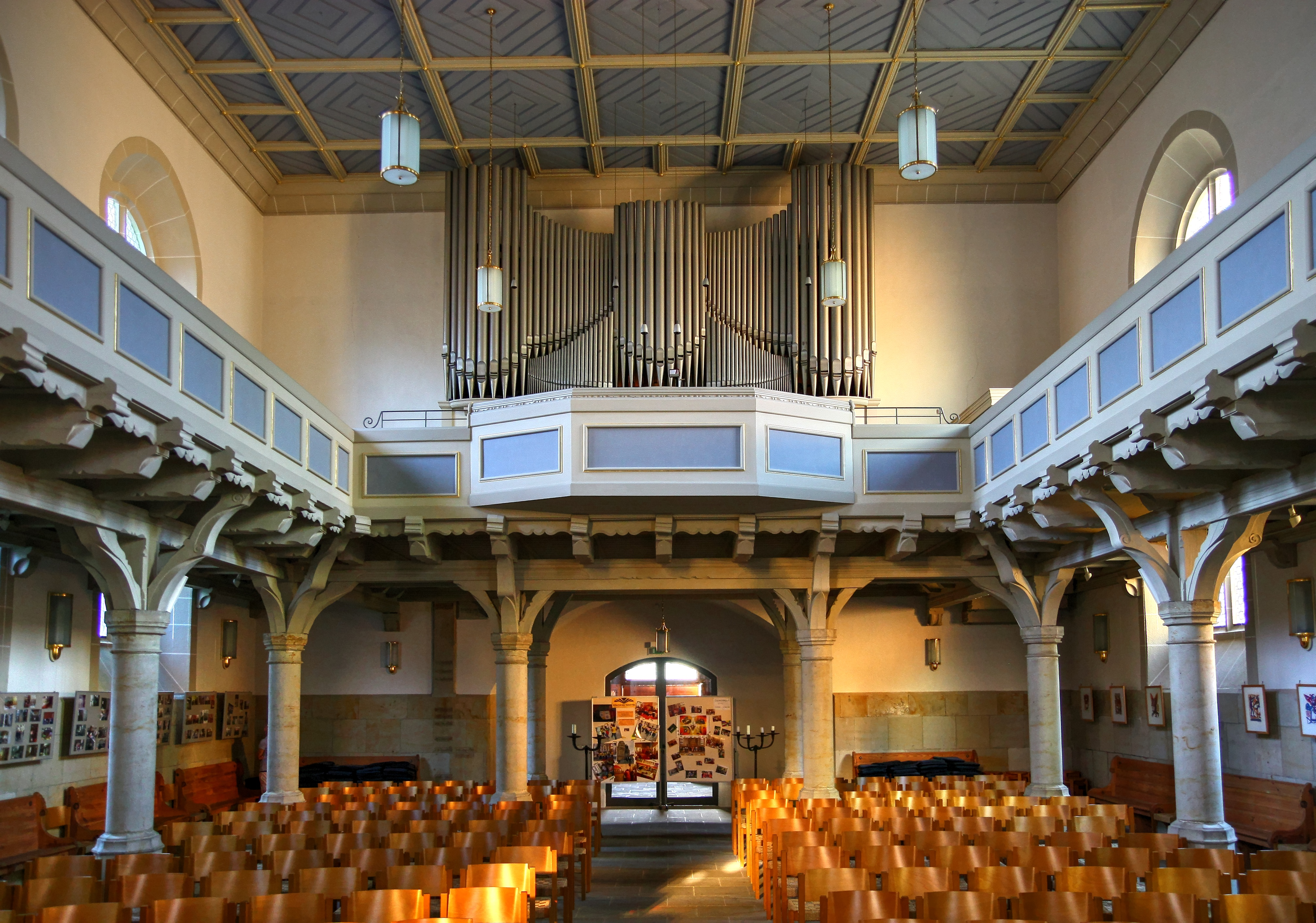 Die St.-Johannis-Kirche in Bad Schandau 2012 - Blick zur Empore mit Jehmlich Orgel